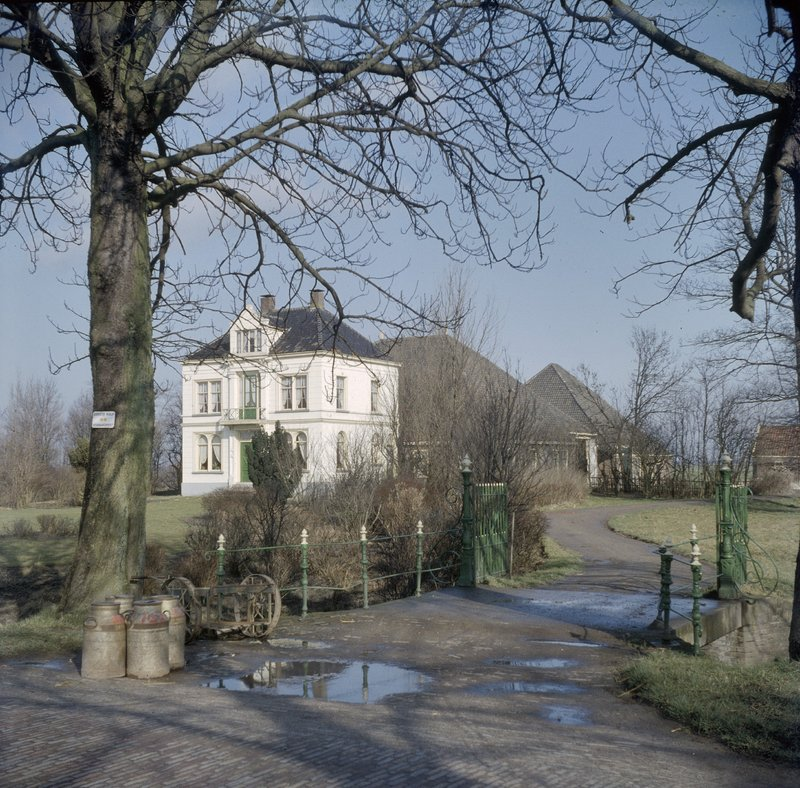 Landgoed Marienheuvel, Buitenplaats Mariënheuvel, Beemster